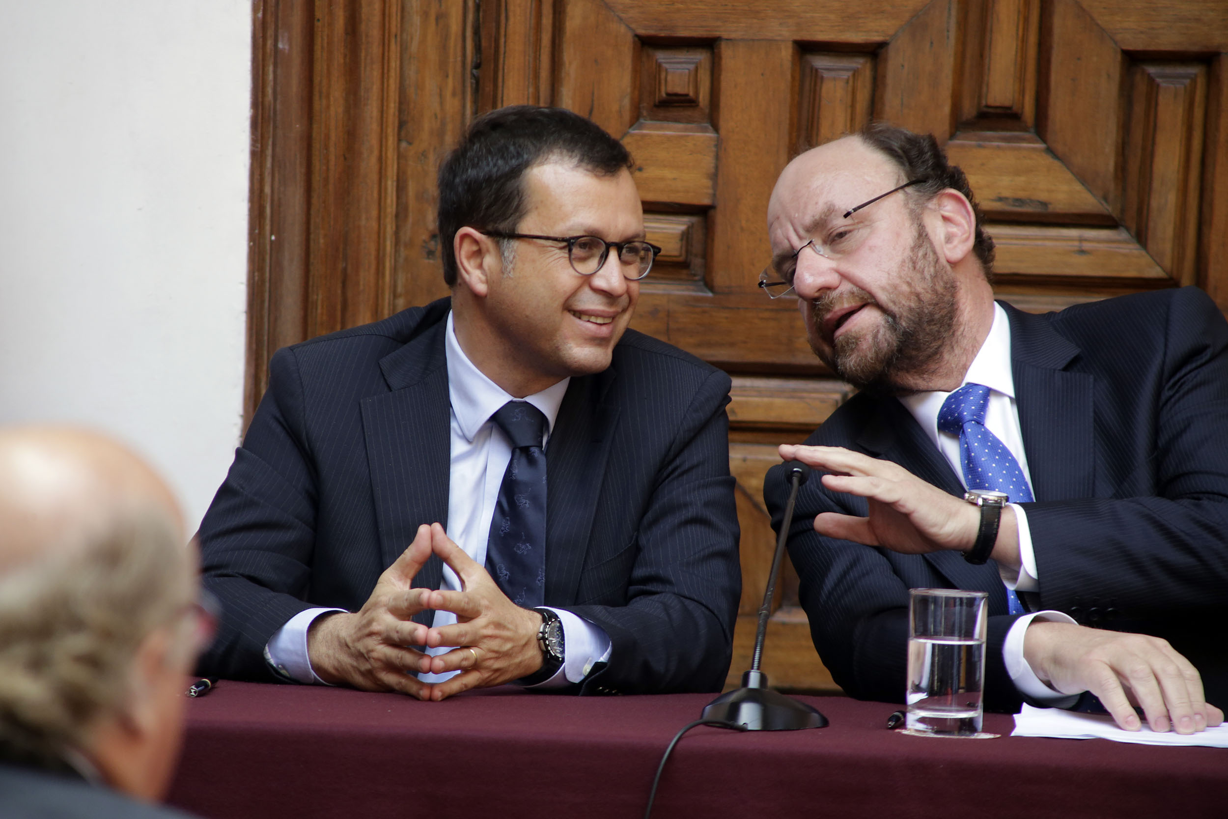 El Ministro de Defensa de Perú, Pedro Cateriano, El Ministro de Defensa de Chile, Rodrigo Hinzpeter, el canciller de Perú, Rafael Roncagliolo y el Canciller de Chile, Alfredo Moreno firman la Declaración Conjunta de la IV Reunión del Comité Permanente de Consulta y Coordinación Política, que se realizó en la Cancillería de la ciudad de Lima.